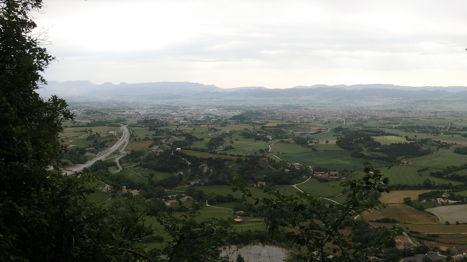 Vista de la Plana de Vic (Osona, Catalunya, Països Catalans) des de l'ermita de Sant Sebastià, entre Gurb i Vic.